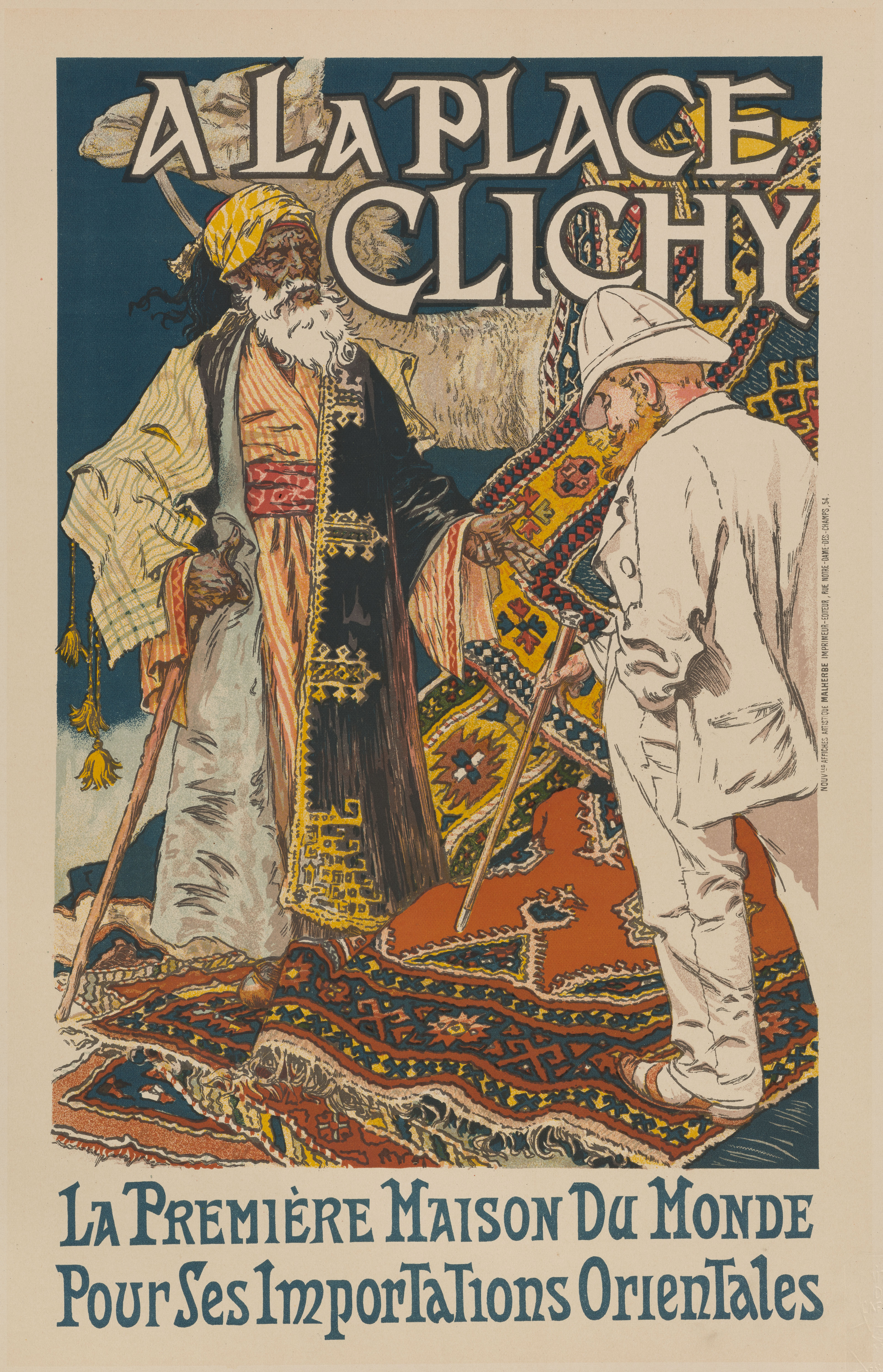 Planche 18 du Les Maîtres de l'Affiche : publication mensuelle contenant la reproduction des plus belles affiches illustrées des grands artistes, français et étrangers, éditée par L'Imprimerie Chaix, Premier Volume, Paris, 1896. 7e Salon des Cent.